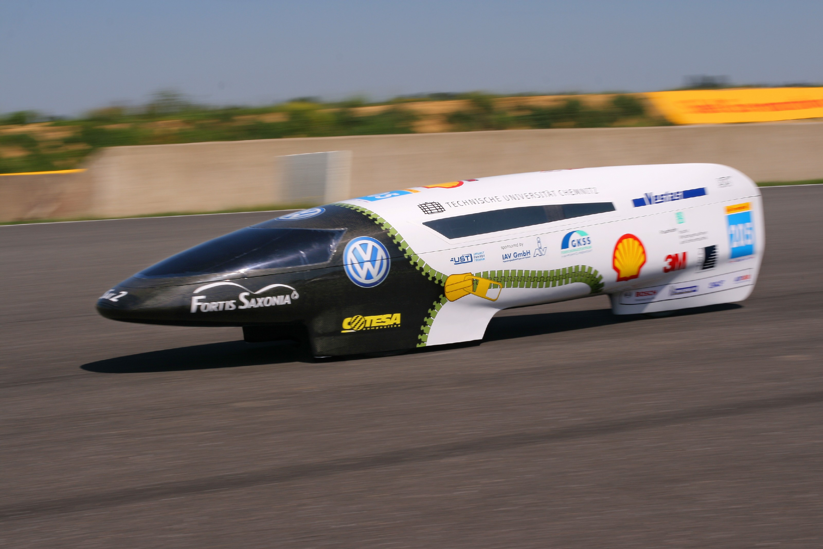 Sax 2 in voller Fahrt